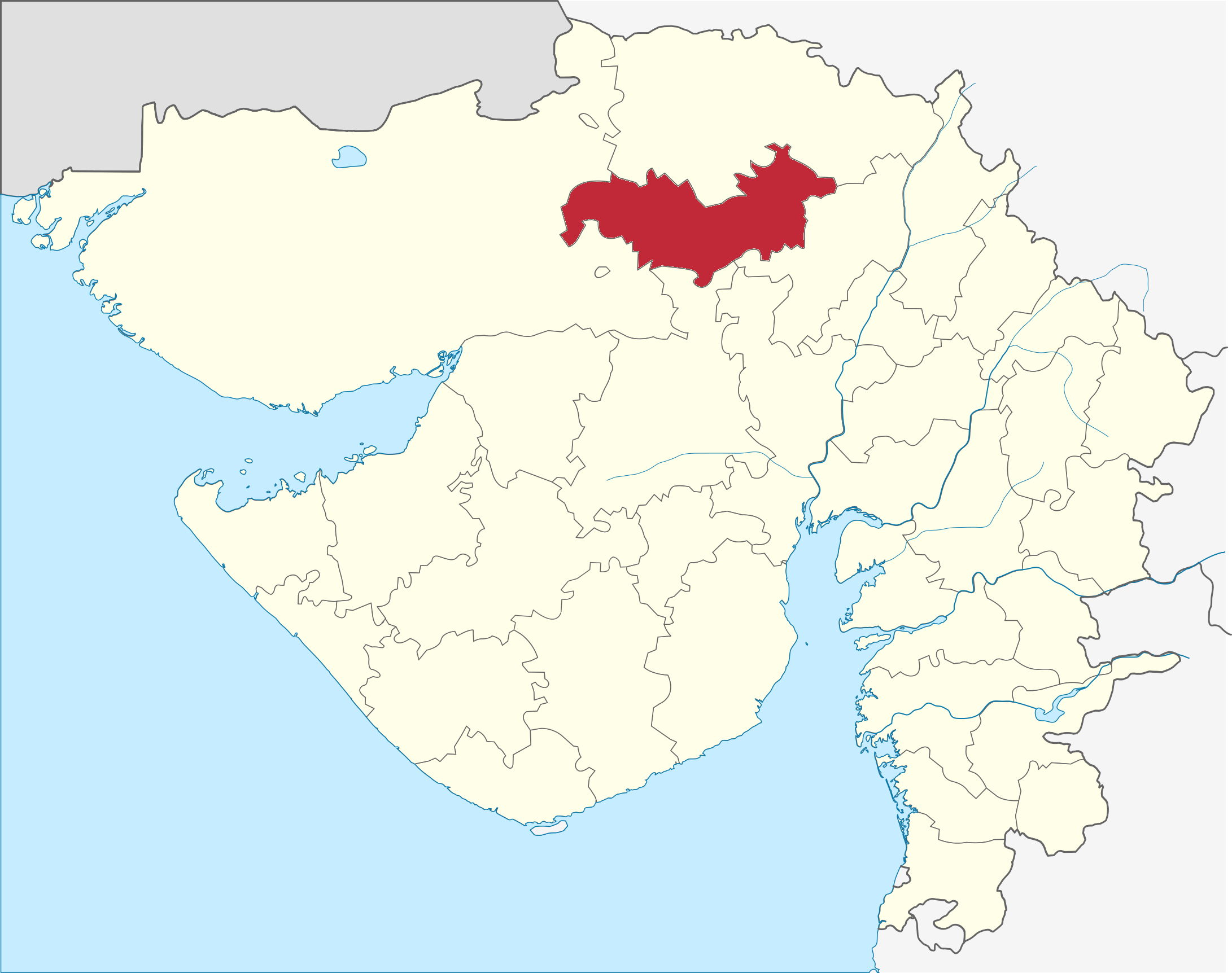 Distrito de Patan en Gujarat